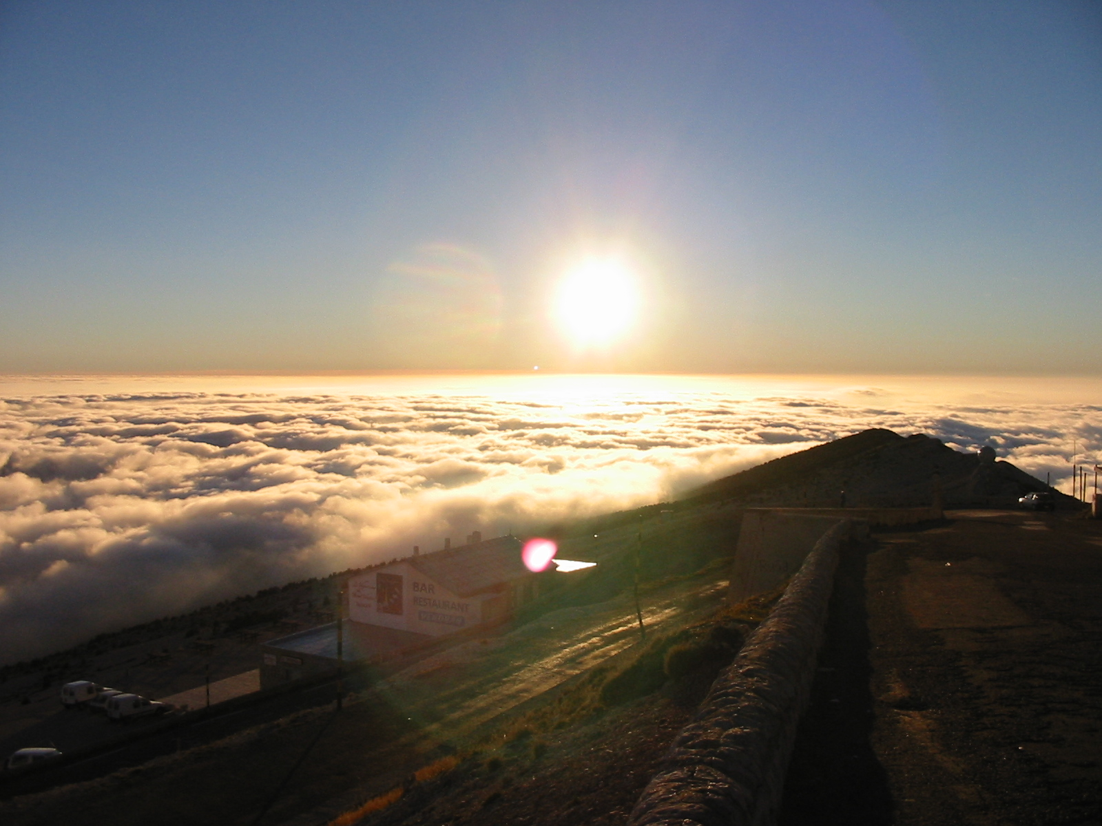 Photographie du sommet du mont Ventoux au dessus des nuages. Fait rare pour un sommet à cette altitude.